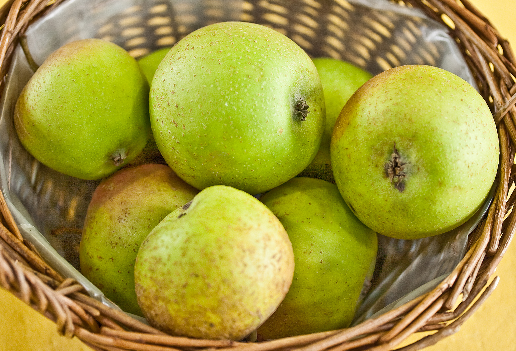 Die Overdiecks Renette ist eine Apfelsorte